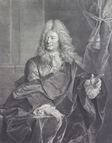 Portrait de Nicolas Delaunay (1646-1727), orfèvre français sous le règne de Louis XIV.